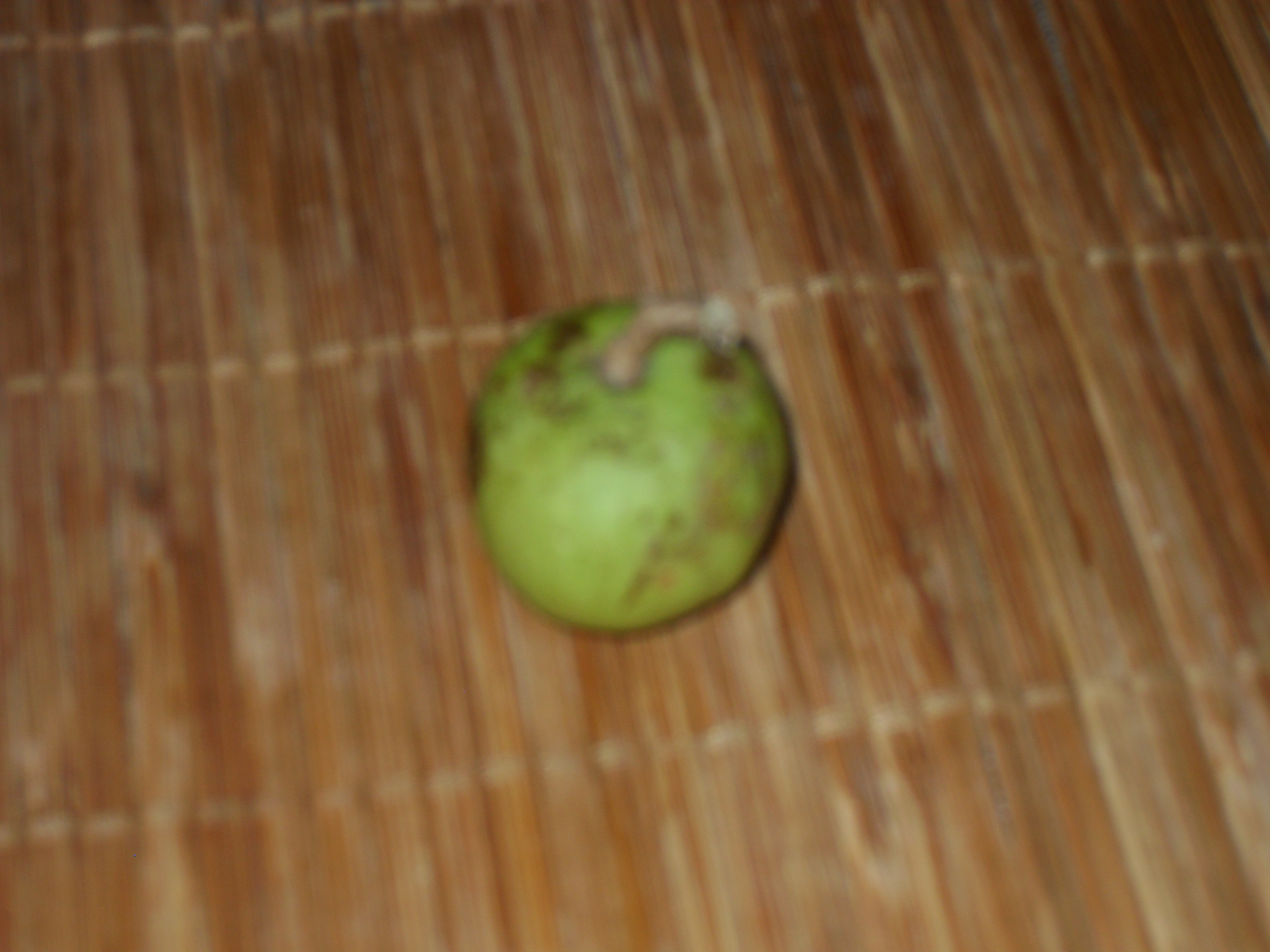 Une vavangue en gestation.